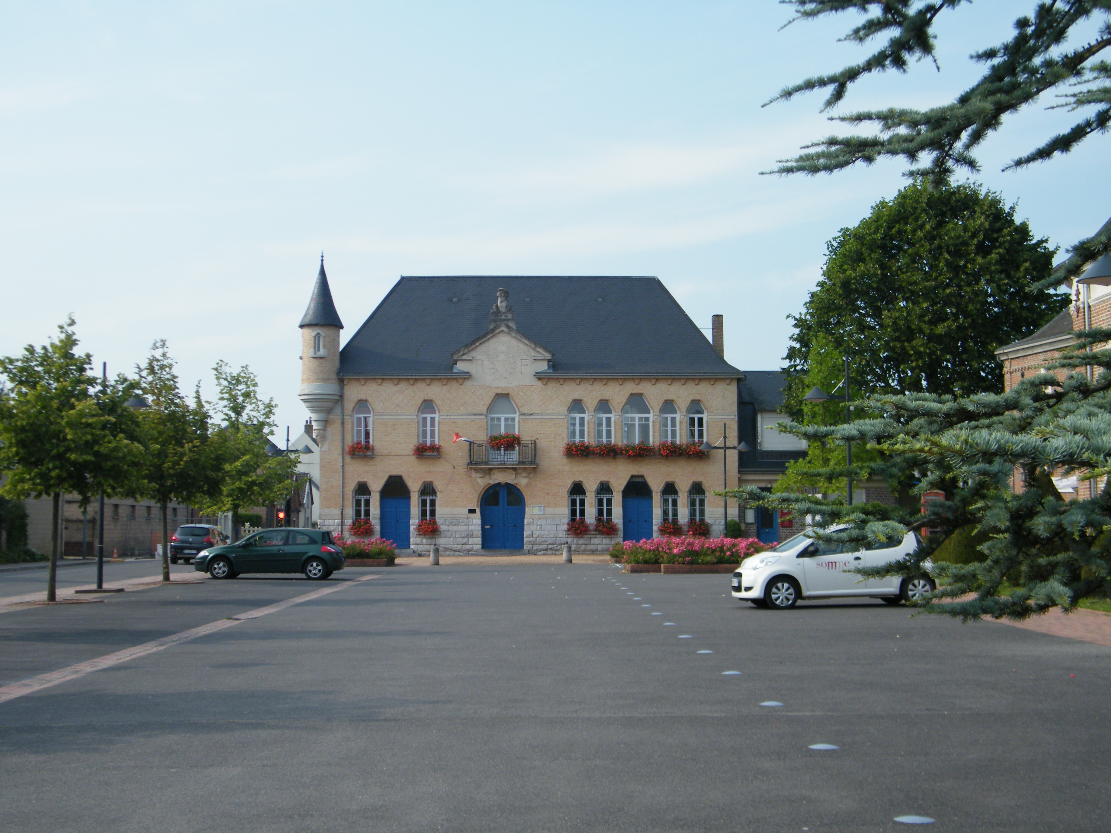 Mairie de Saint-Léger-lès-Domart, Somme, France.